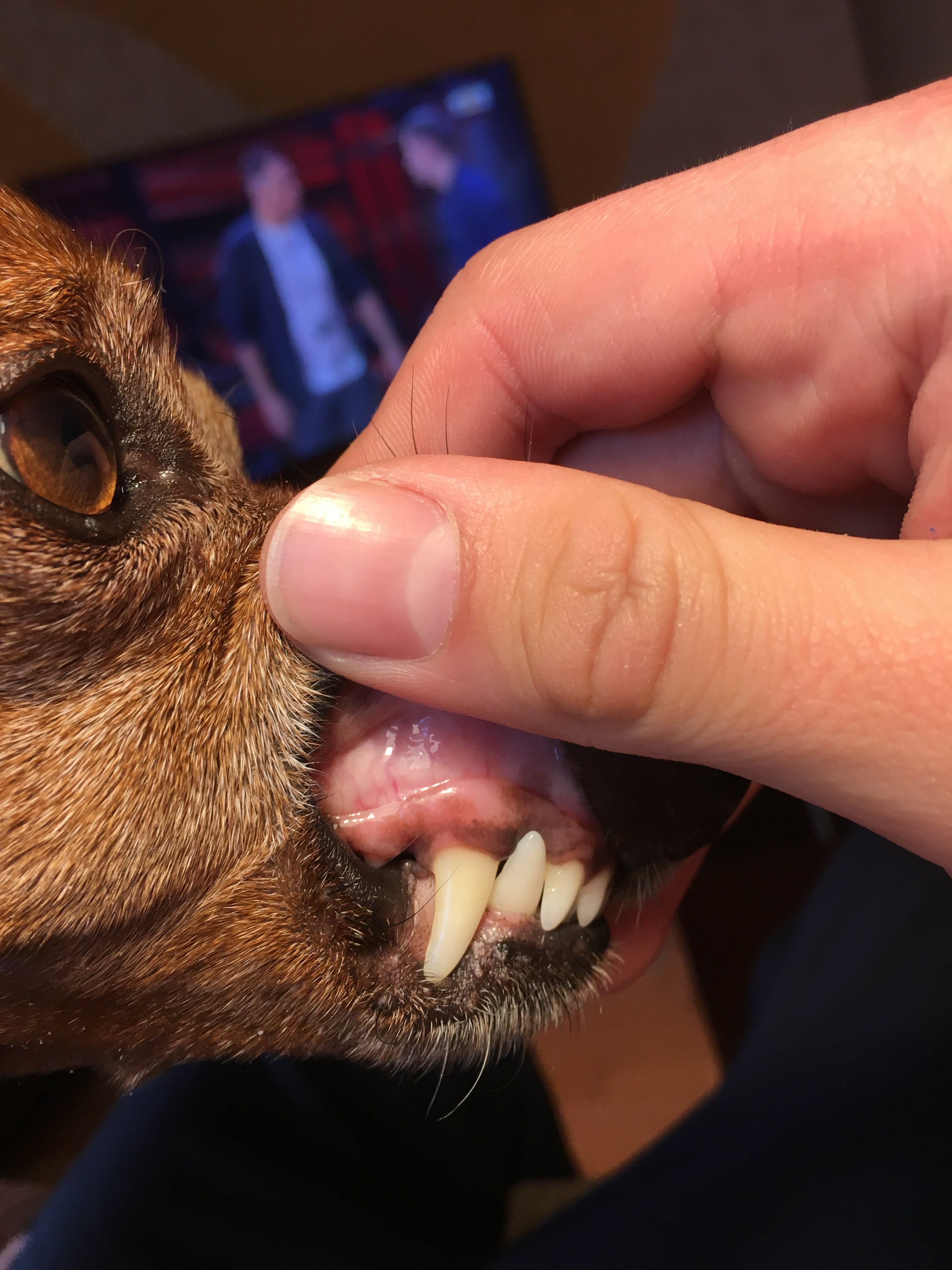 Kääbuspinšeri hambad.